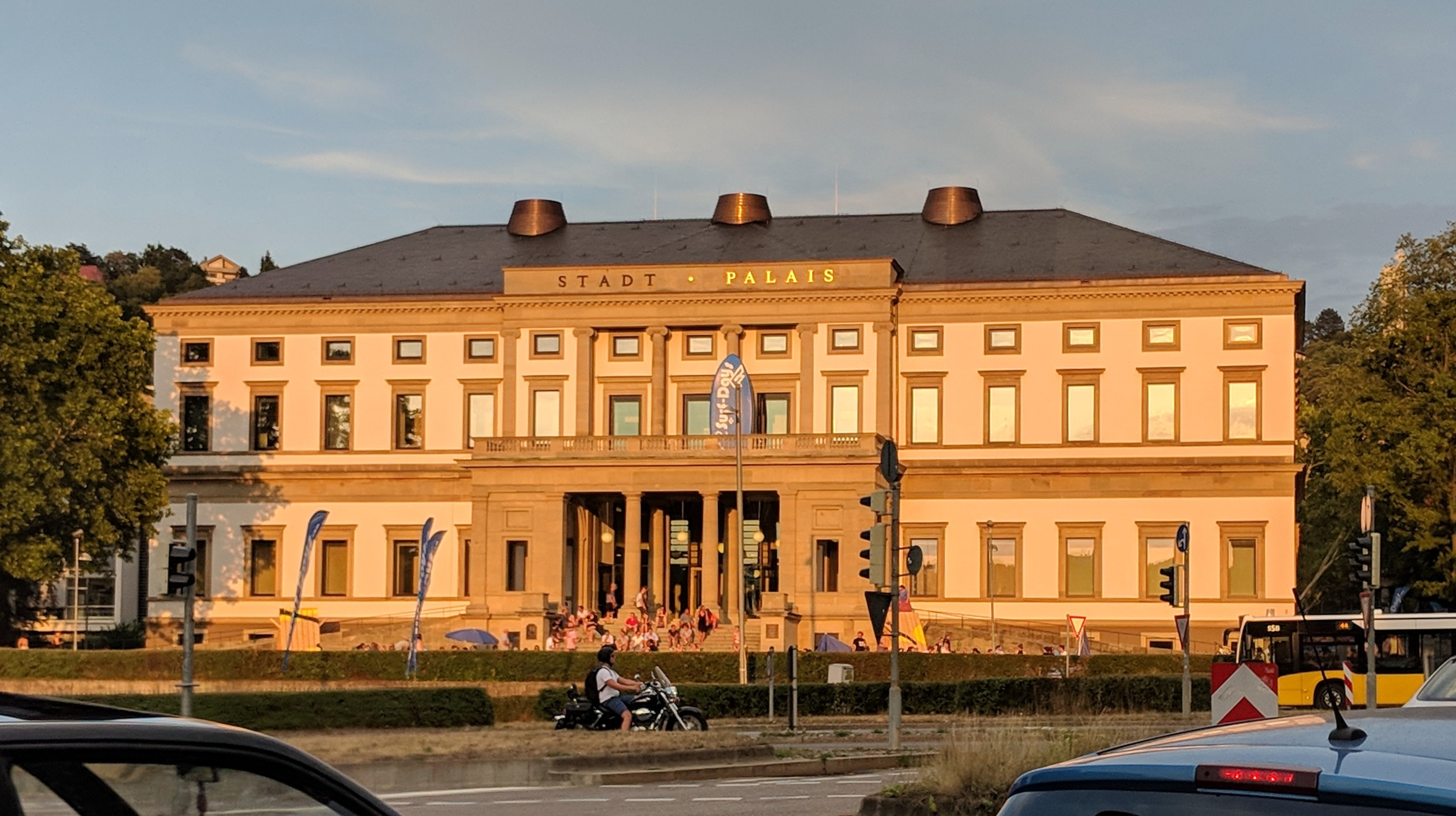 Das Stadtmuseum Stuttgart im Abendlicht